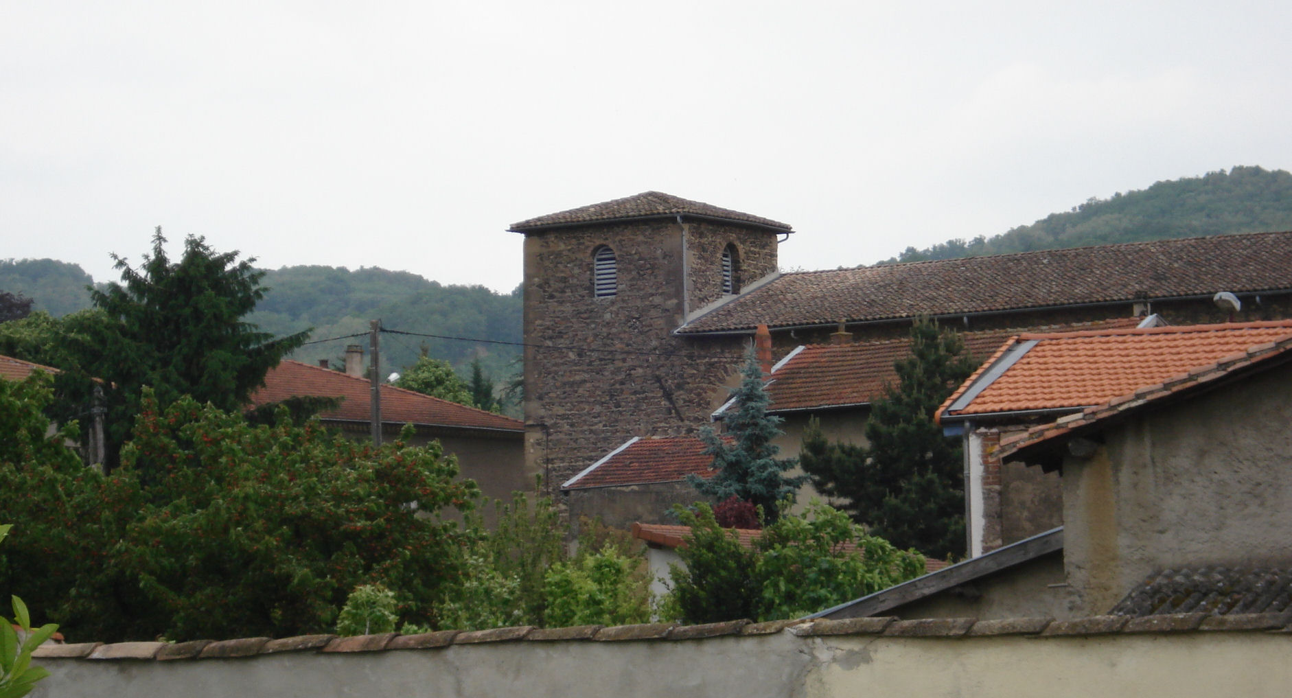 Beausemblant dans la Drôme